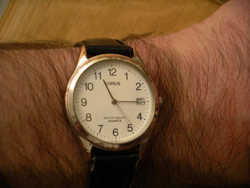 Montre commune se portant au poignet.